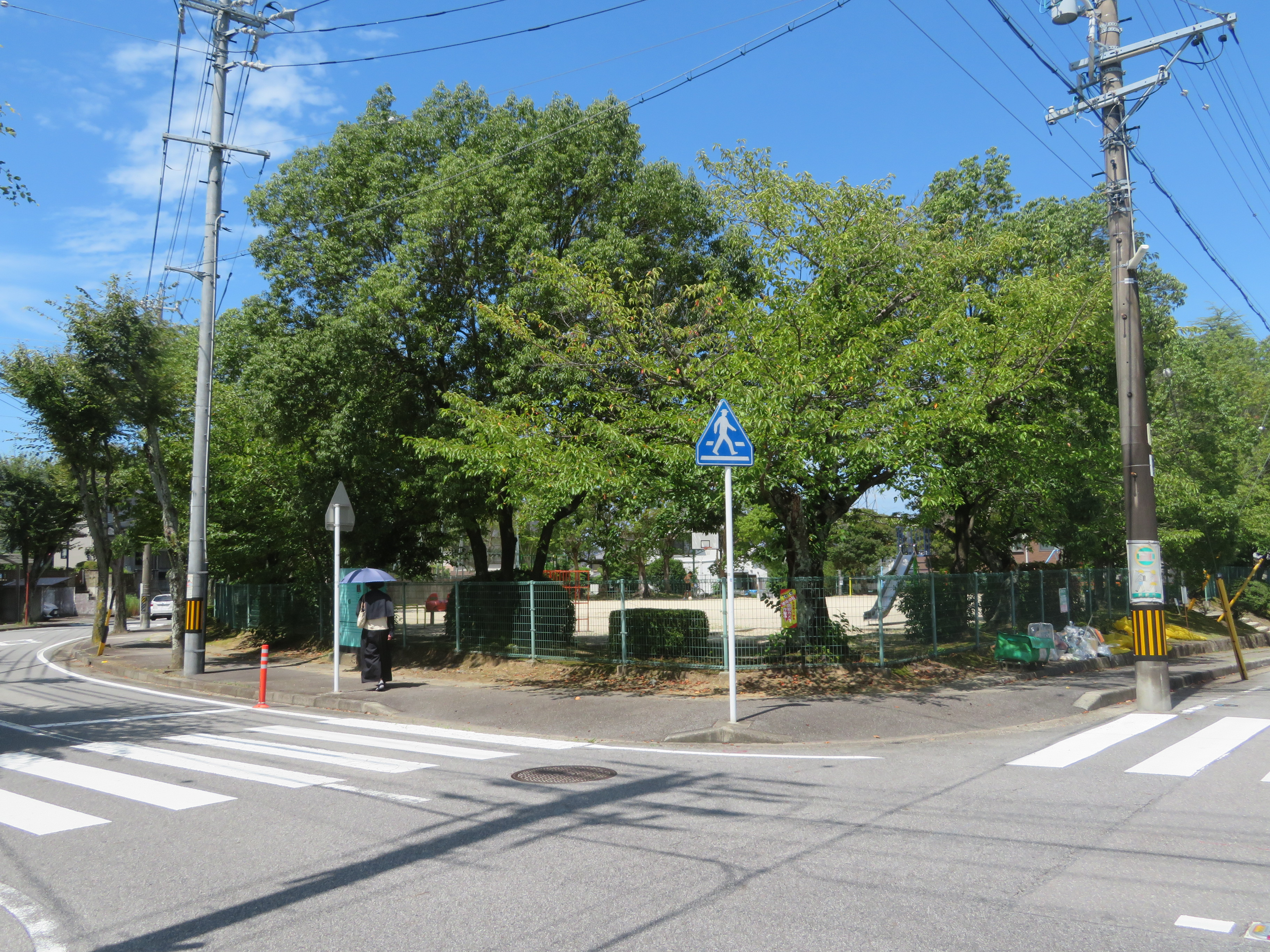 北斗台3号公園（岡崎市細川町）